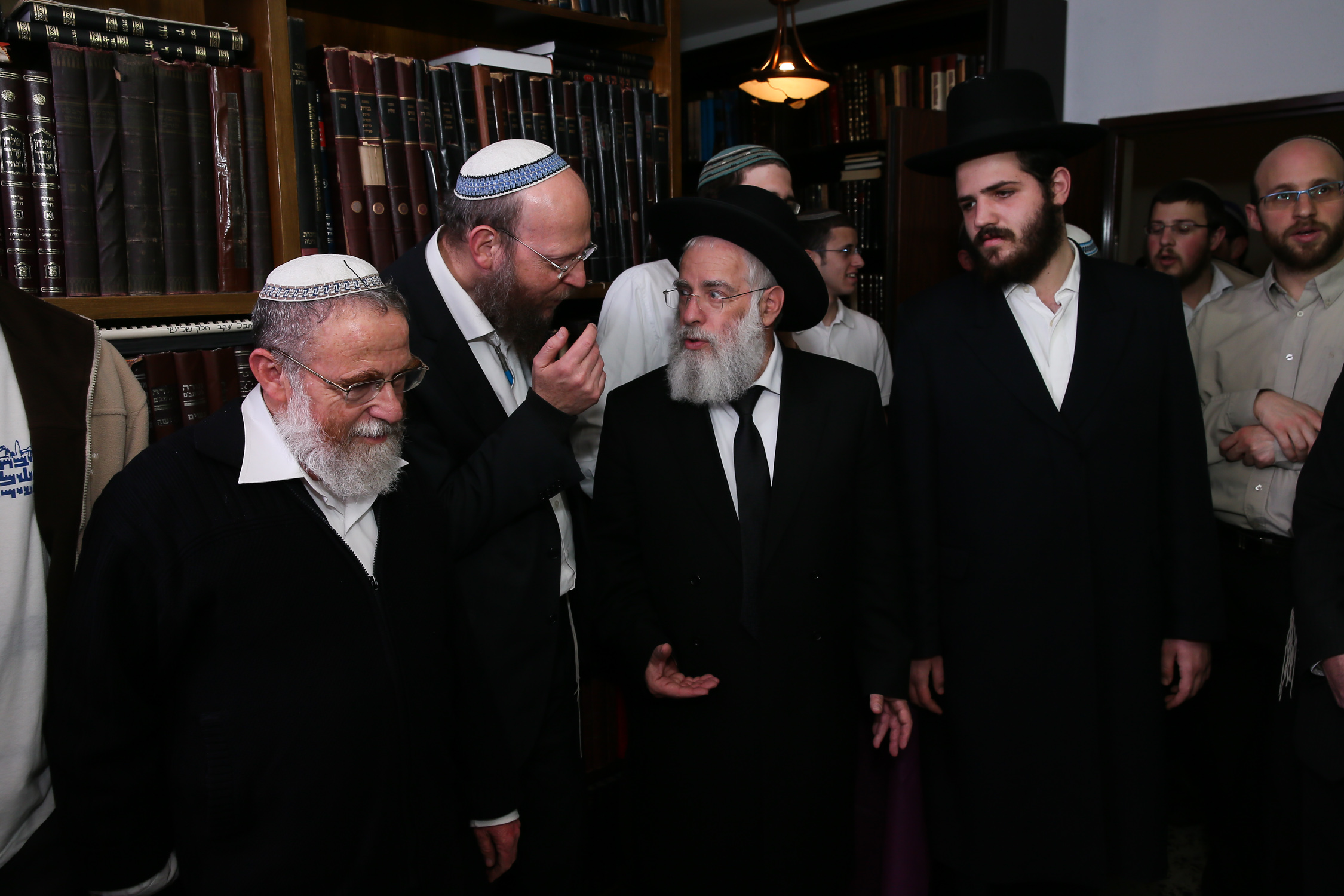 ישיבת מרכז הרב. הרב יאיר גזבר יחד עם הרב יעקב שפירא